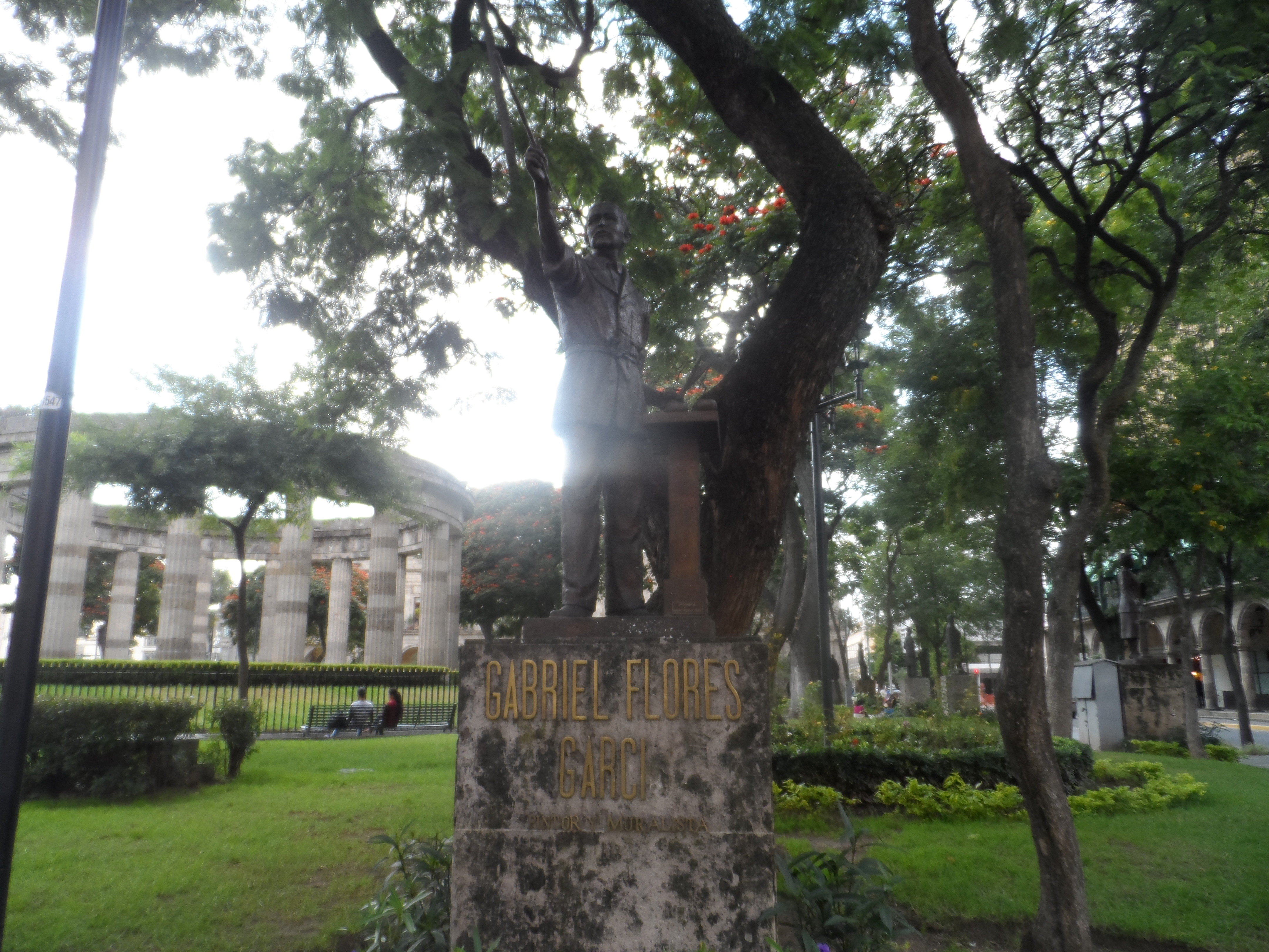 Estatua del pintor jalisciense Gabriel Flores García en la "Rotonda de los Jaliscienses Ilustres".